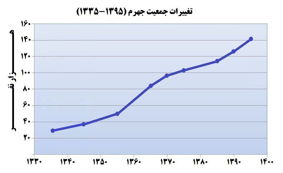 نقشه تغییرات جمعیتی جهرم